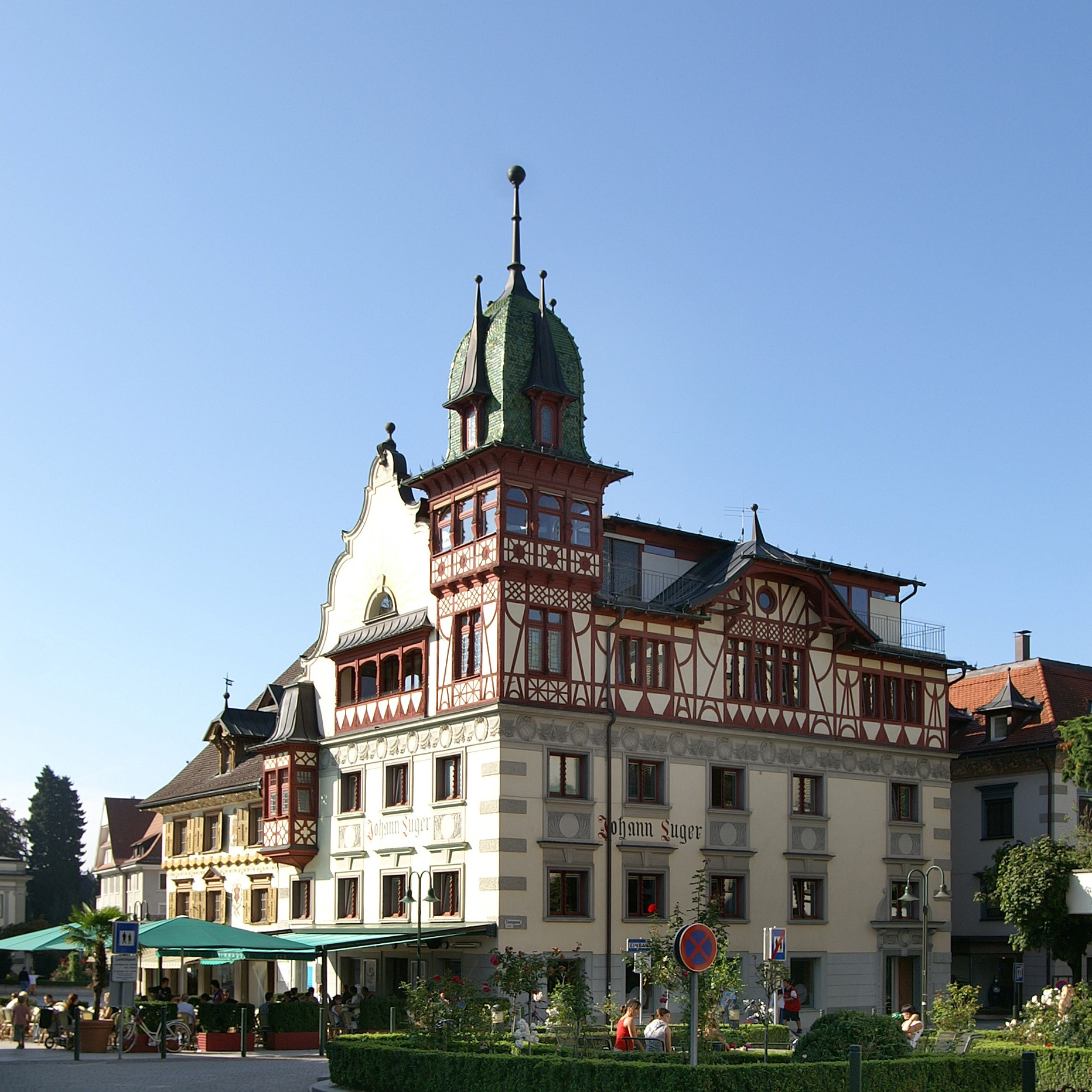 Johann-Luger-Haus, Umbau (1900) Marktplatz Dornbirn, Fassade von Architekt Hanns Kornberger, ehemals Gasthof Sonne - heute Cafe Steinhauser